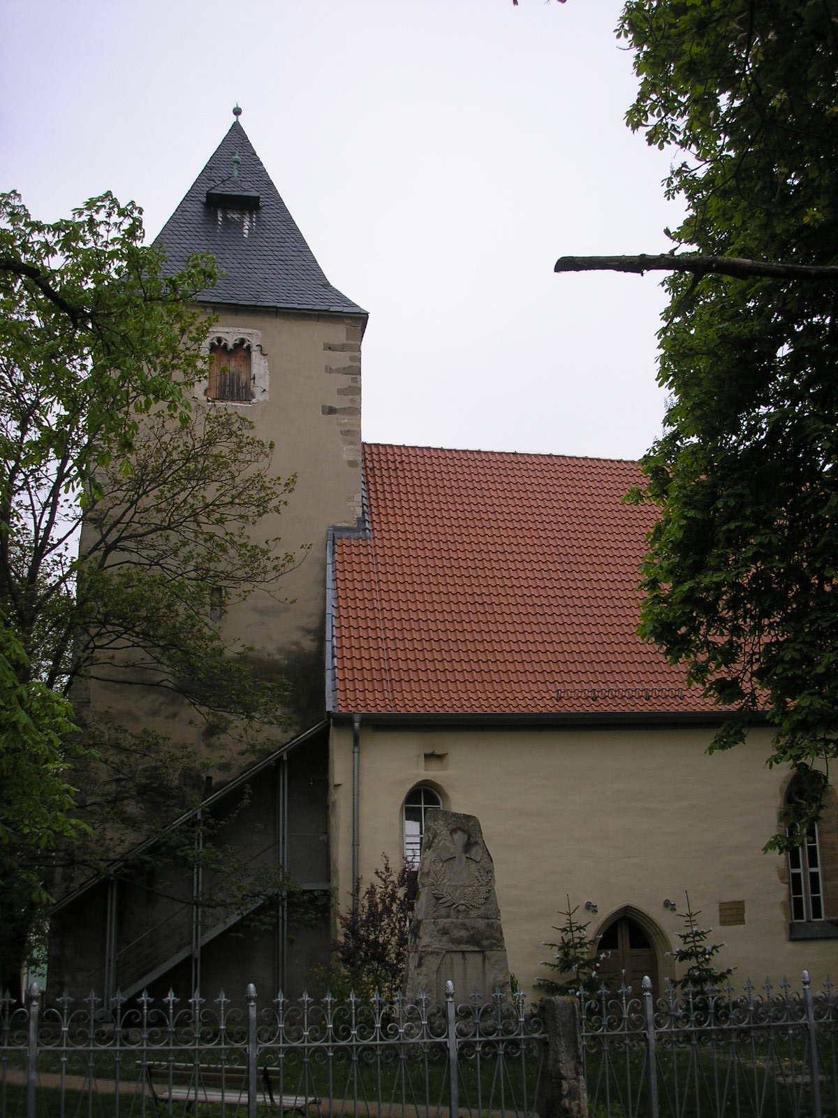 Die Kirche von Großballhausen (Thüringen). - Dorfkirche St Vitii in Groß-Ballhausen